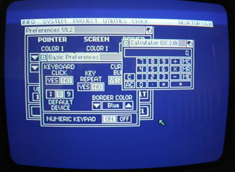 Skærmbillede af The Final Cartridge 3 på en commodore 64 crt skærm